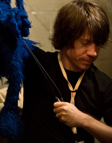 BlogHer 08 - Sesame Street Suite